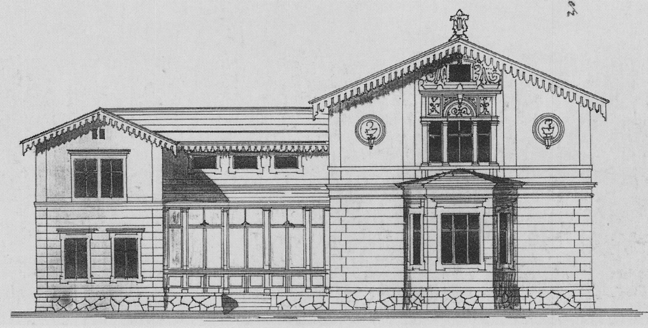 Radebeul, Haus Rudell, Bauzeichnung